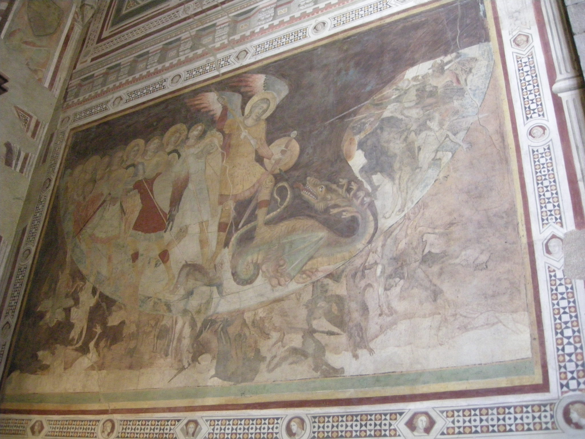 Cappella velluti, affreschi maestro anonimo